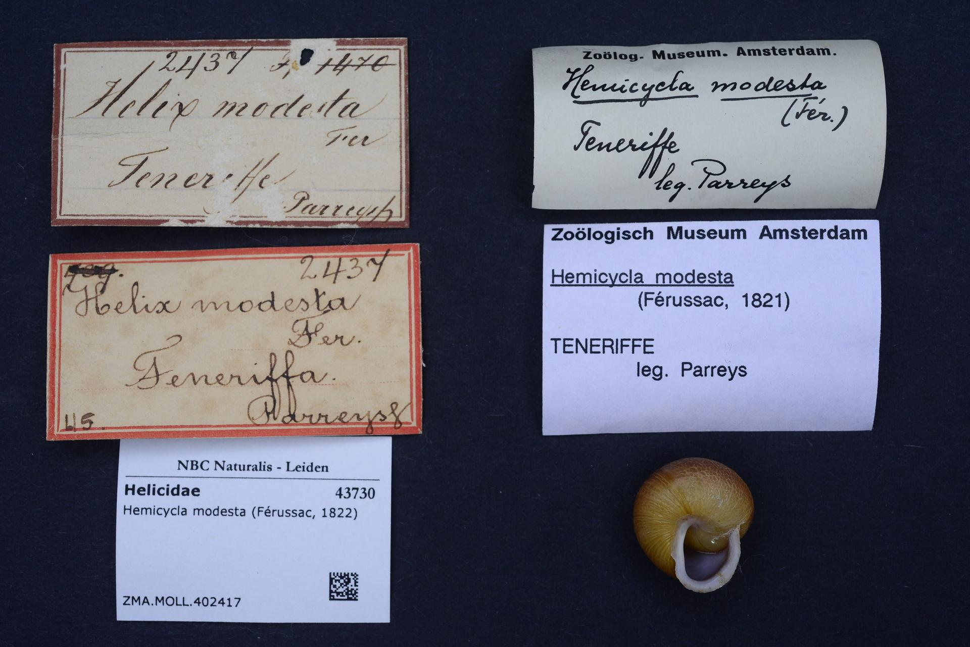 Hemicycla modesta (Férussac, 1822)